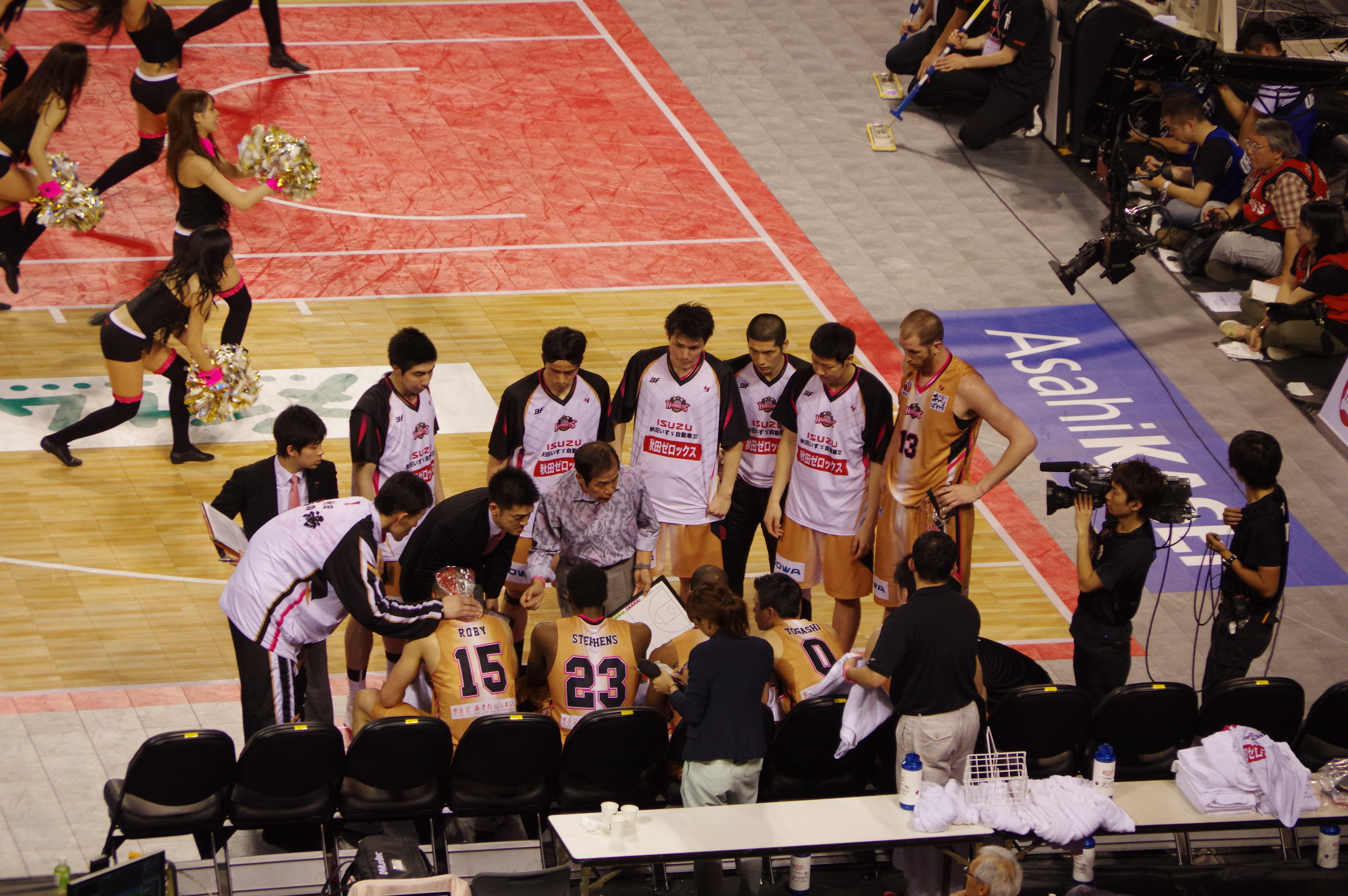 ｂｊリーグ 2013-2014シーズン プレイオフ ファイナルズ_026